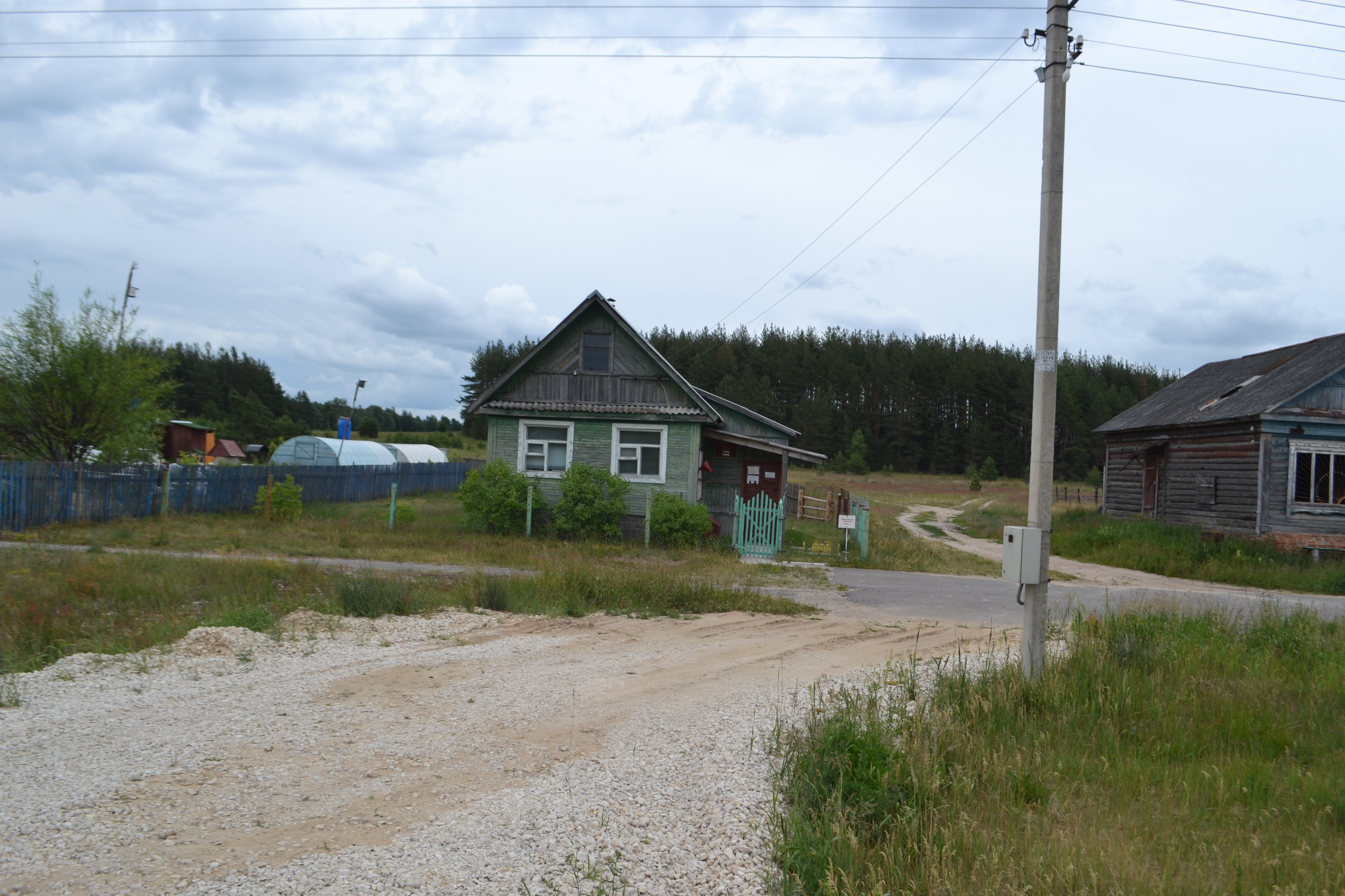 ФАП в деревне Ворово (Шатурский район)